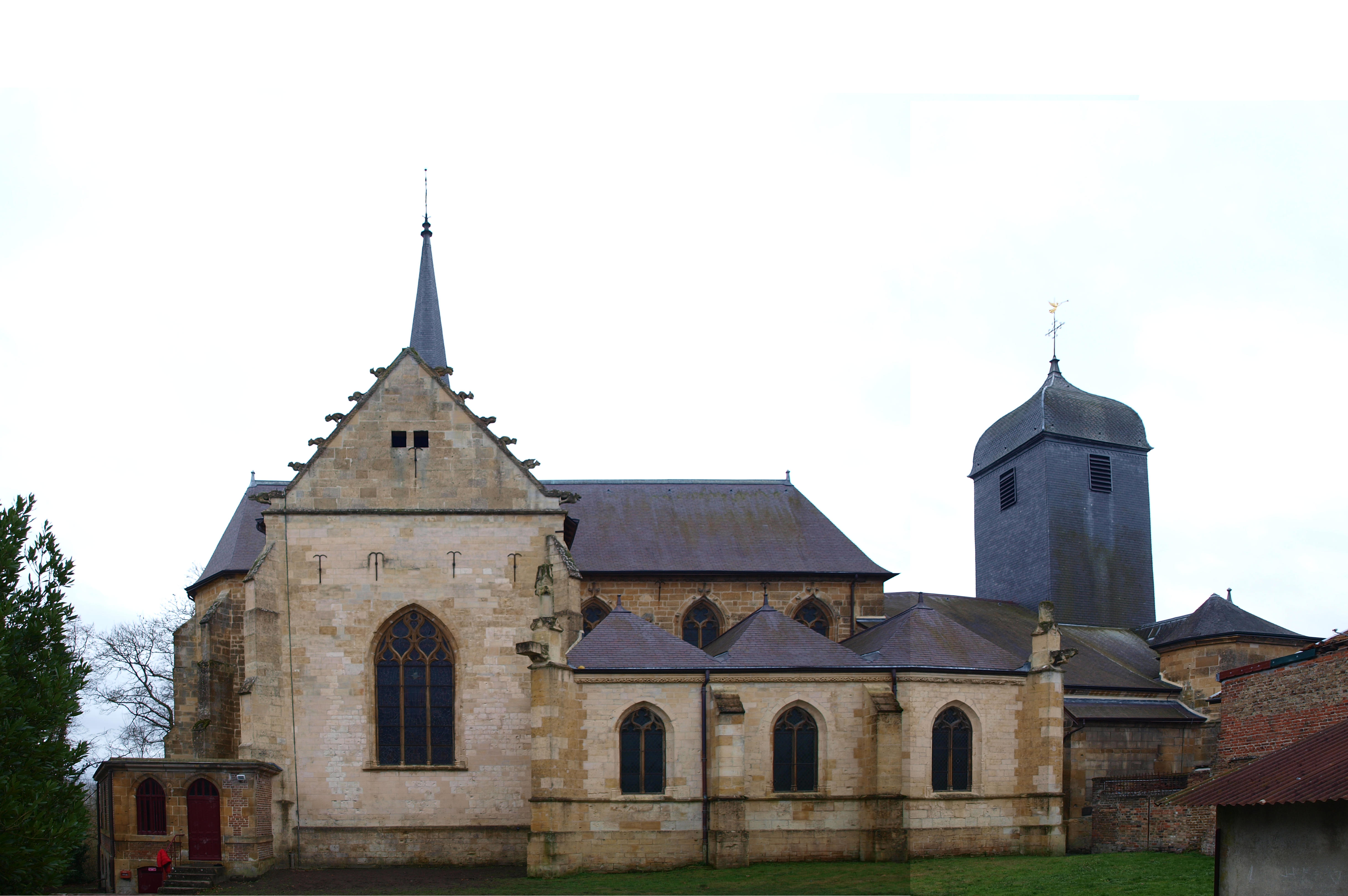 Vouziers (Ardennes, France) ; l'église Saint-Maurille.